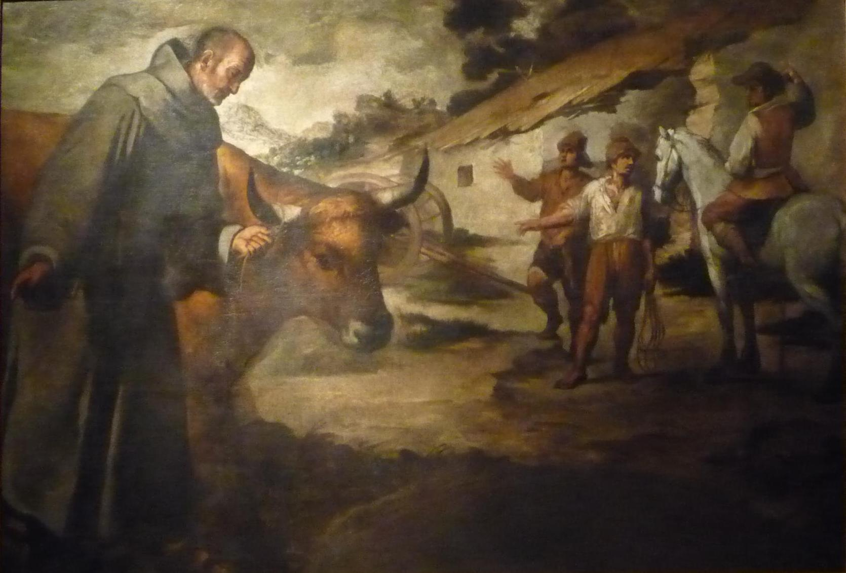 La obra muestra a San Francisco Solano (1549-1610) junto a un toro.